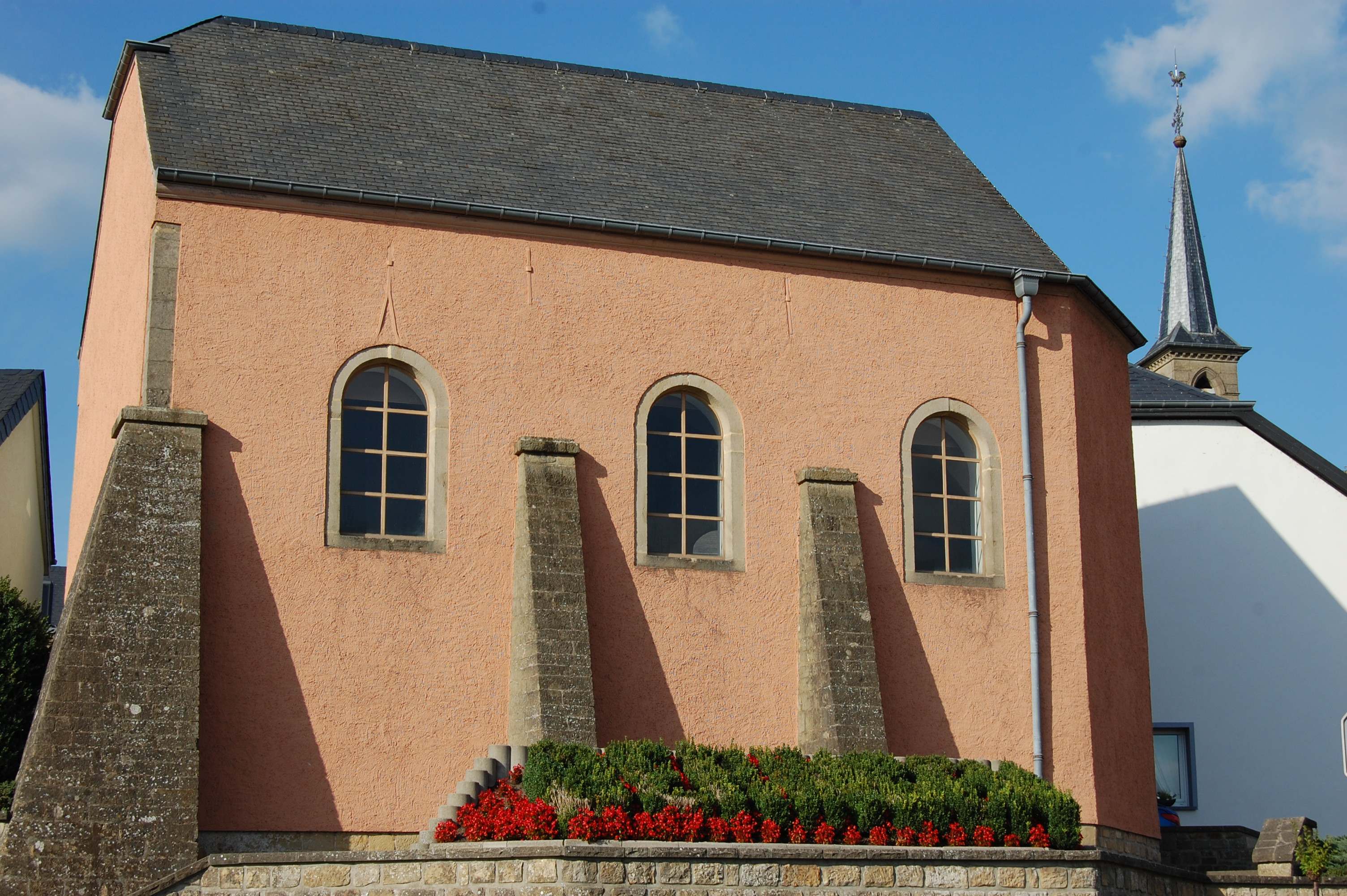 Kapell Biereng